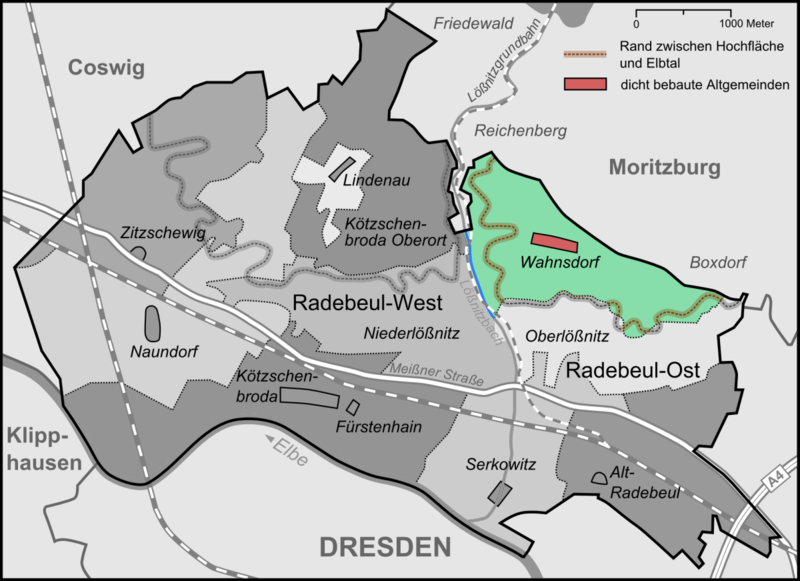 Karte der Stadtteile und Umlandgemeinden Radebeuls, hier Stadtteil Wahnsdorf